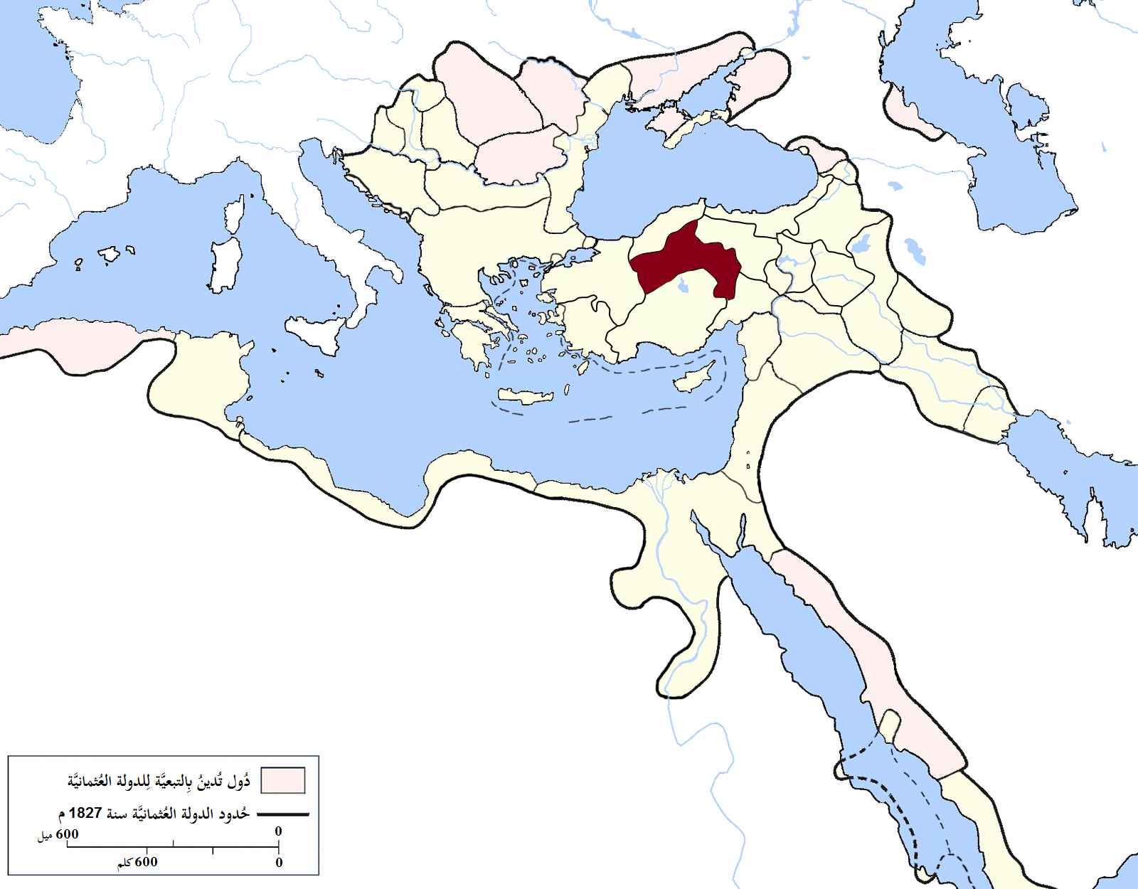 إيالة أنقرة في الدولة العُثمانيَّة سنة 1827م.